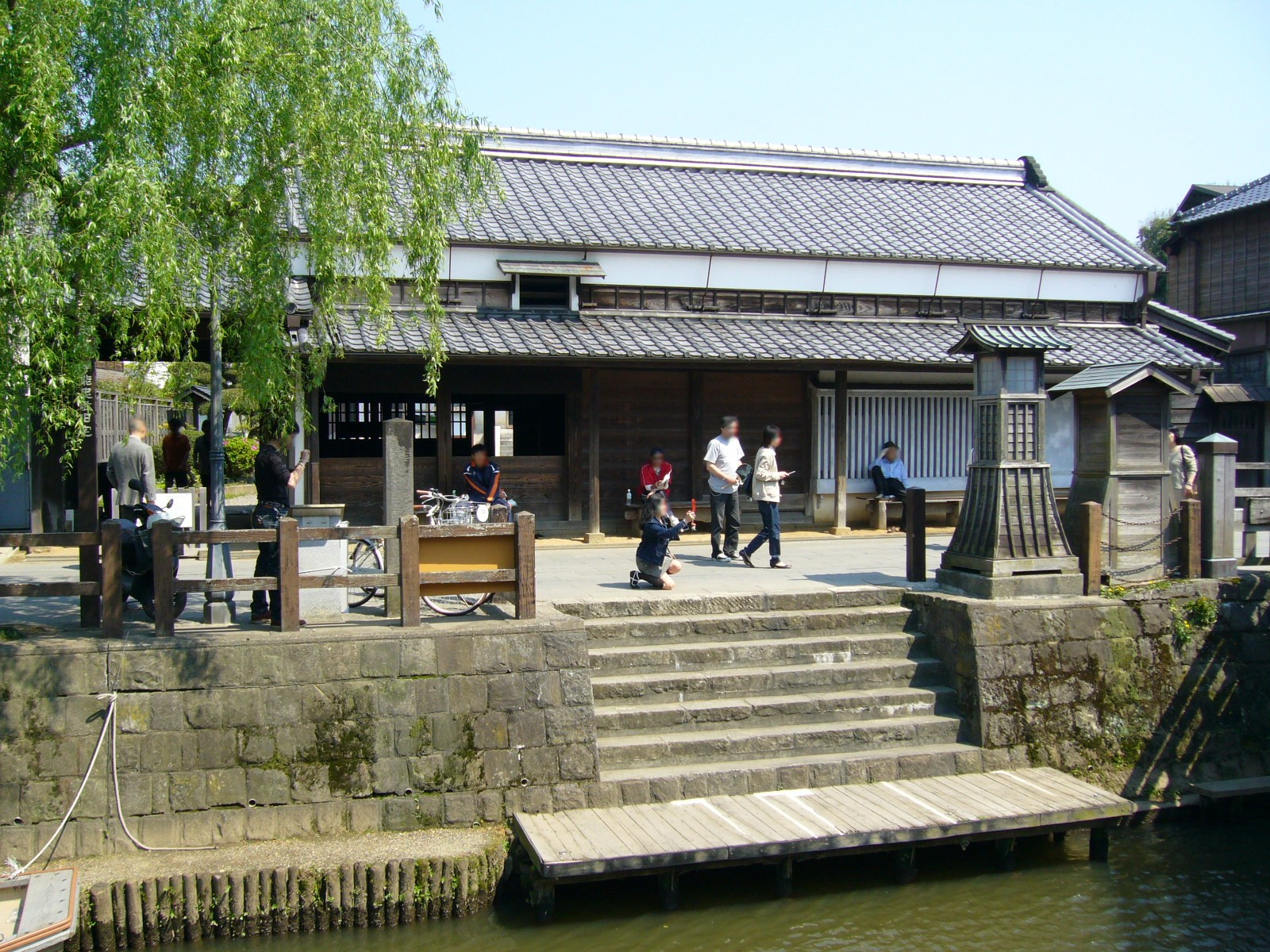 inou-tadataka-house,katori-city,japan